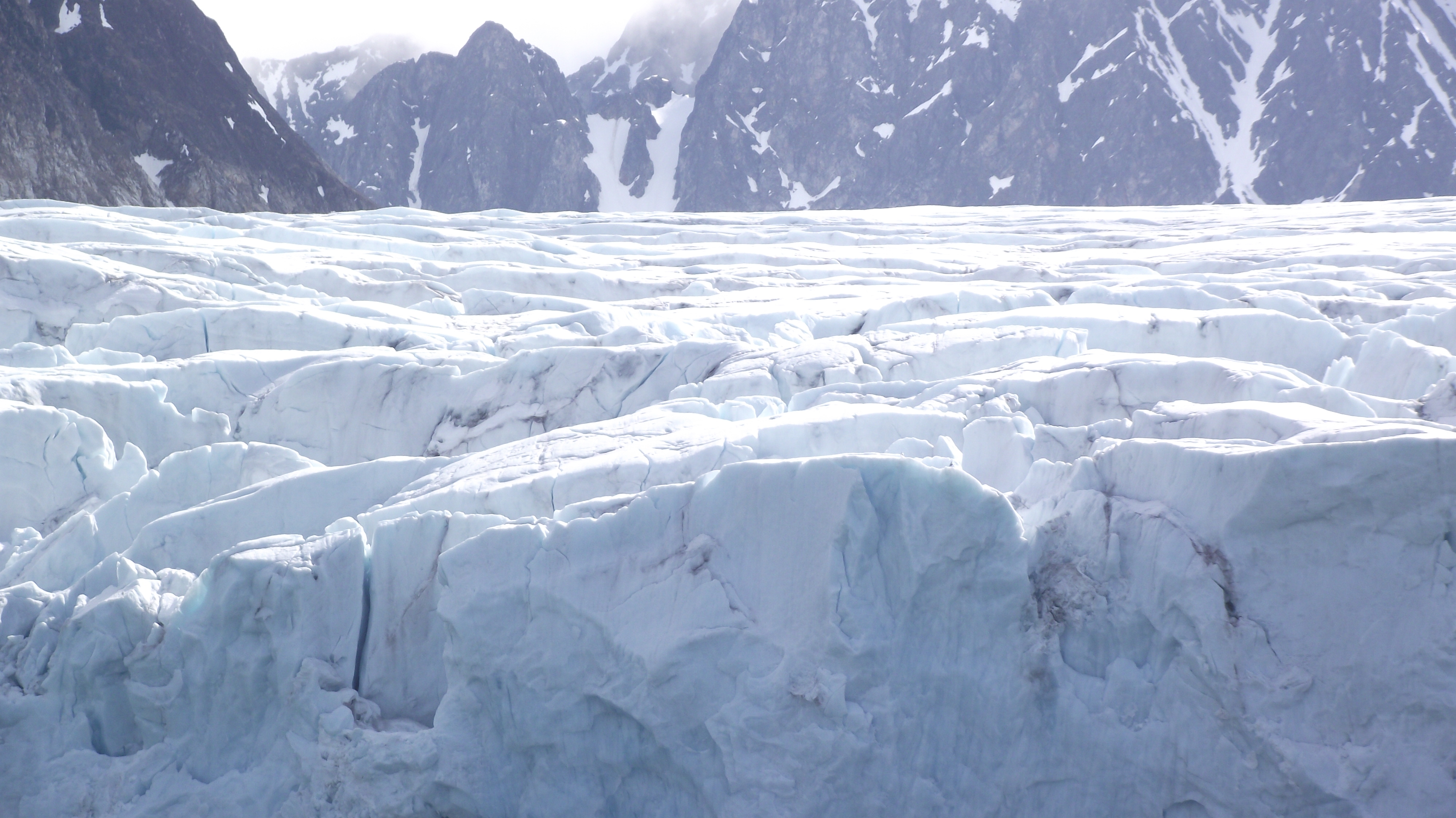 Waggonwaybreen aan de Magdalenefjorden bij Spitsbergen eiland